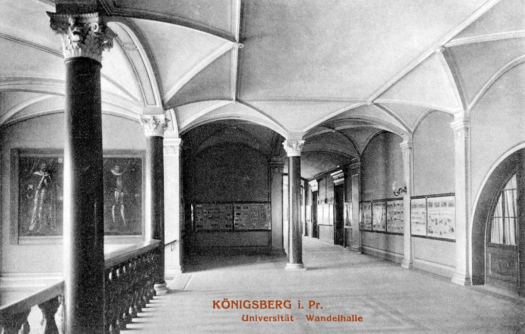 Wandelhalle der Albertina in Königsberg